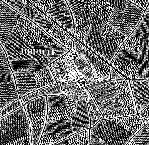 Carte Abbe Delagrive - détail sur Houilles, Yvelines, France